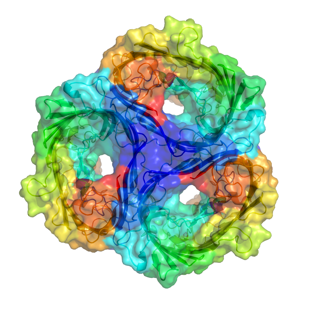 Sucrose specific porin 1A0S